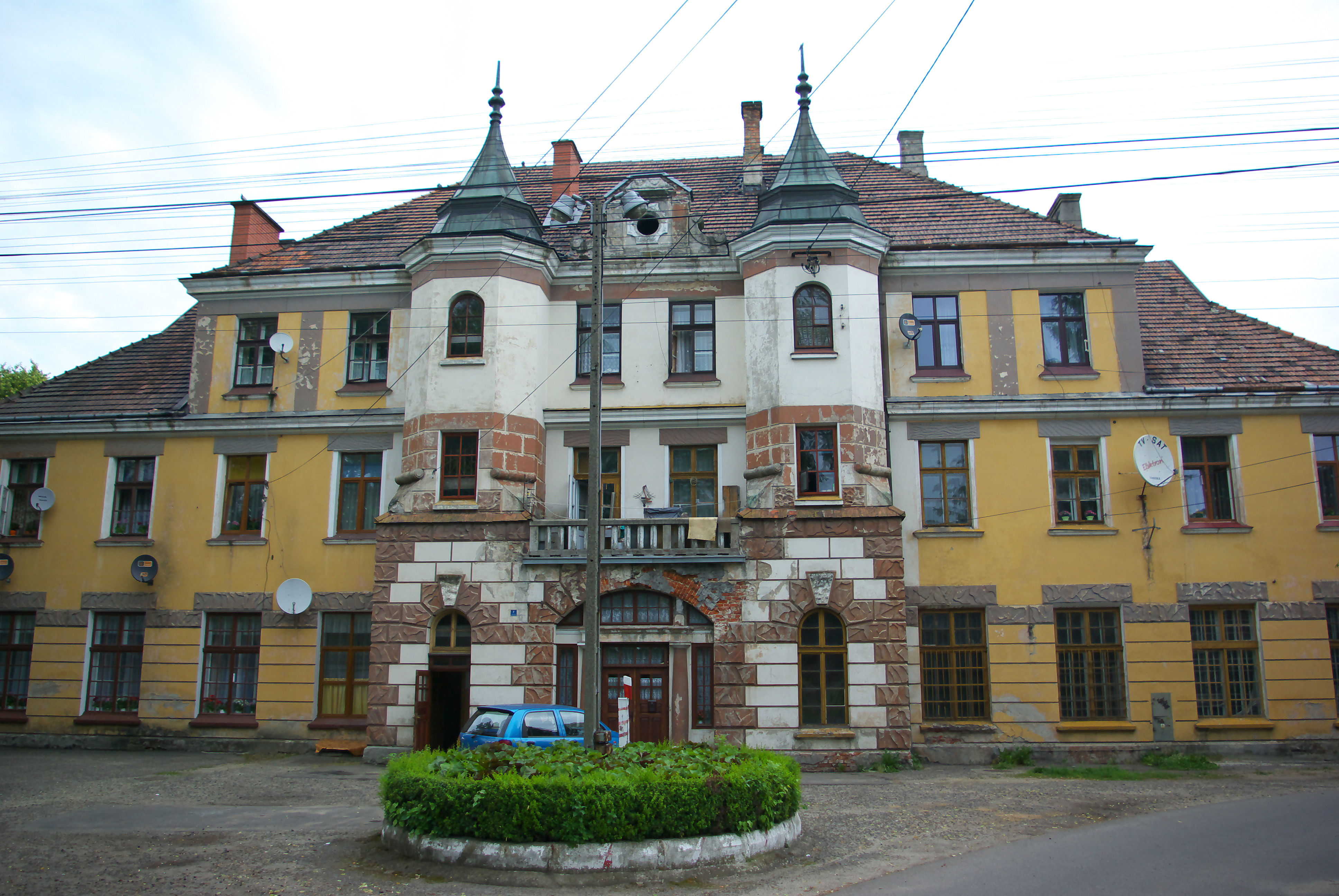 Stacja kolejowa Nowy Zagórz